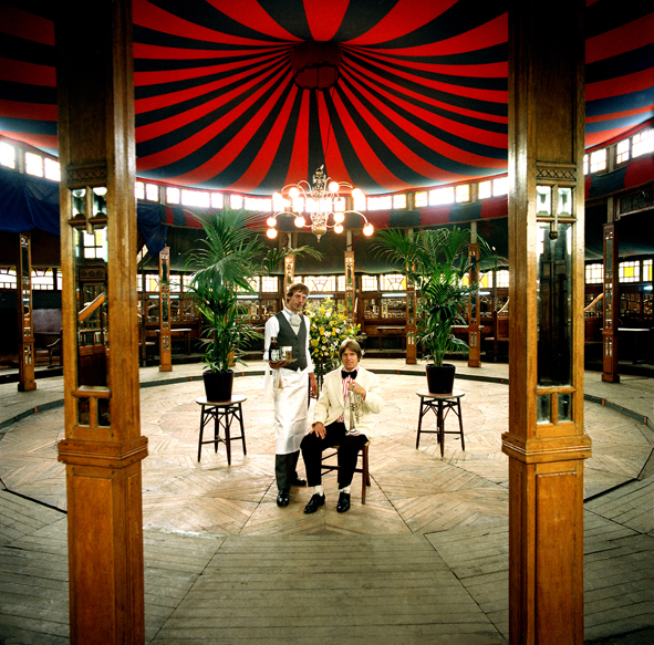 Tentmeester Kees Eyrond en eigenaar Jelle van der Zee in de Spiegeltent "The Famous Spiegeltent" Foto gemaakt in 1980.